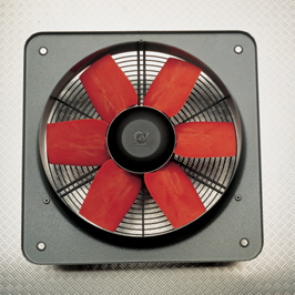 Aspiratore industriale Vortice